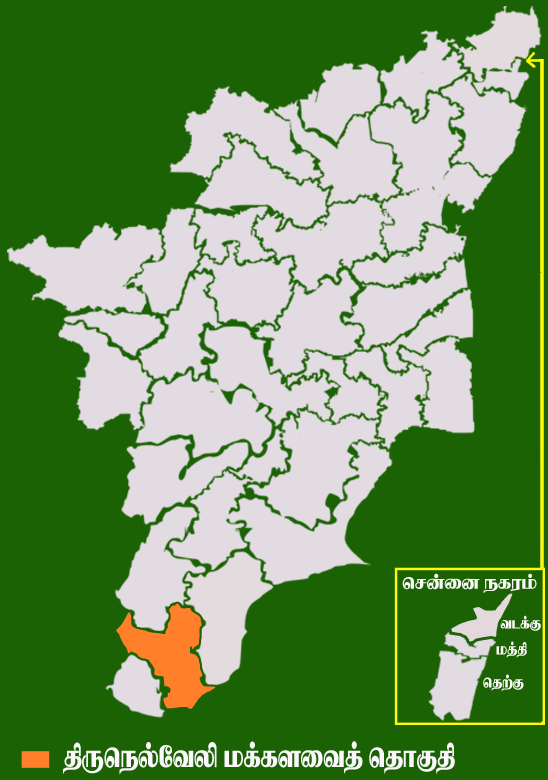 தமிழக வரைபடத்தில் உள்ள திருநெல்வேலி மக்களவைத் தொகுதி